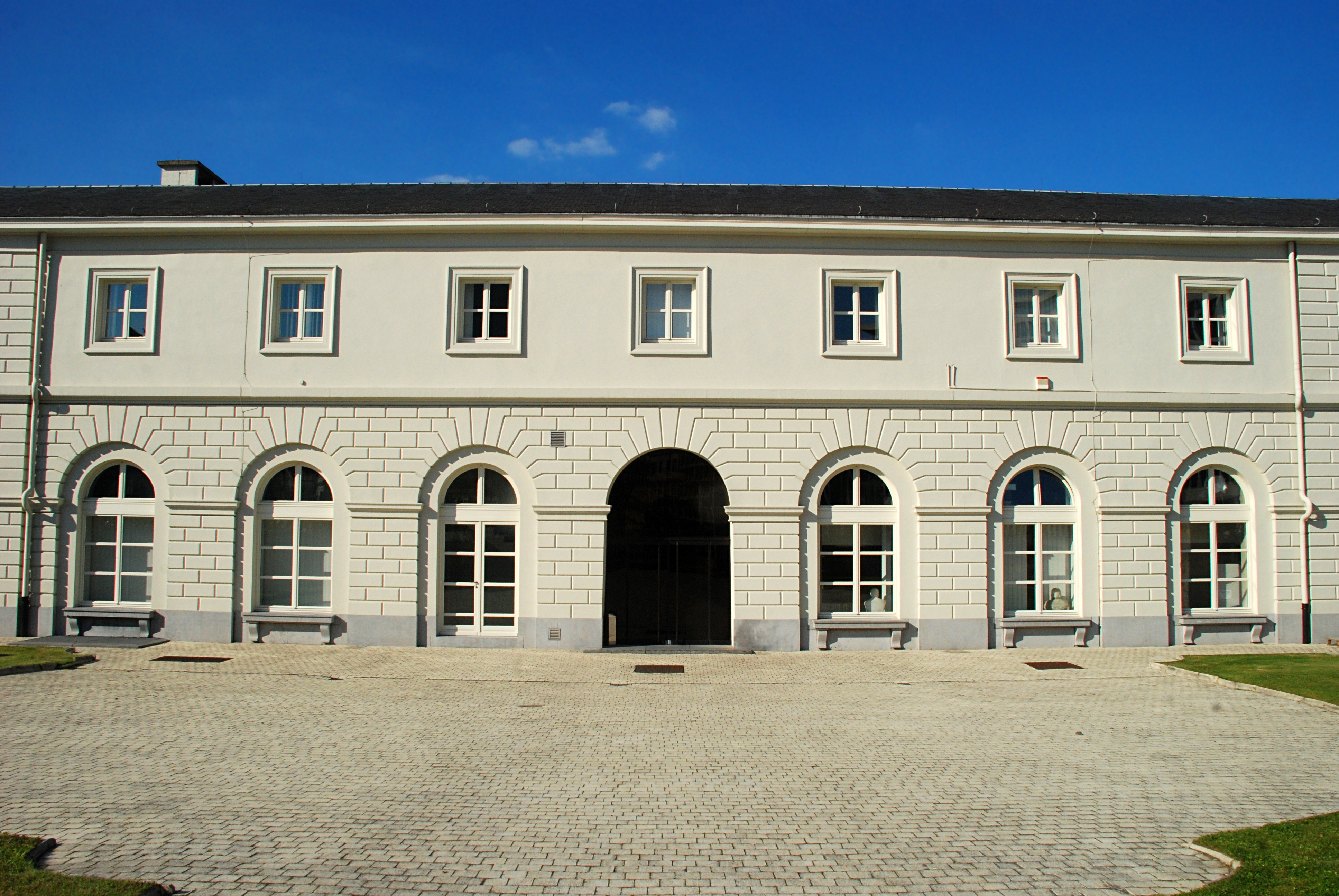 Belgique - Bruxelles - Écuries royales